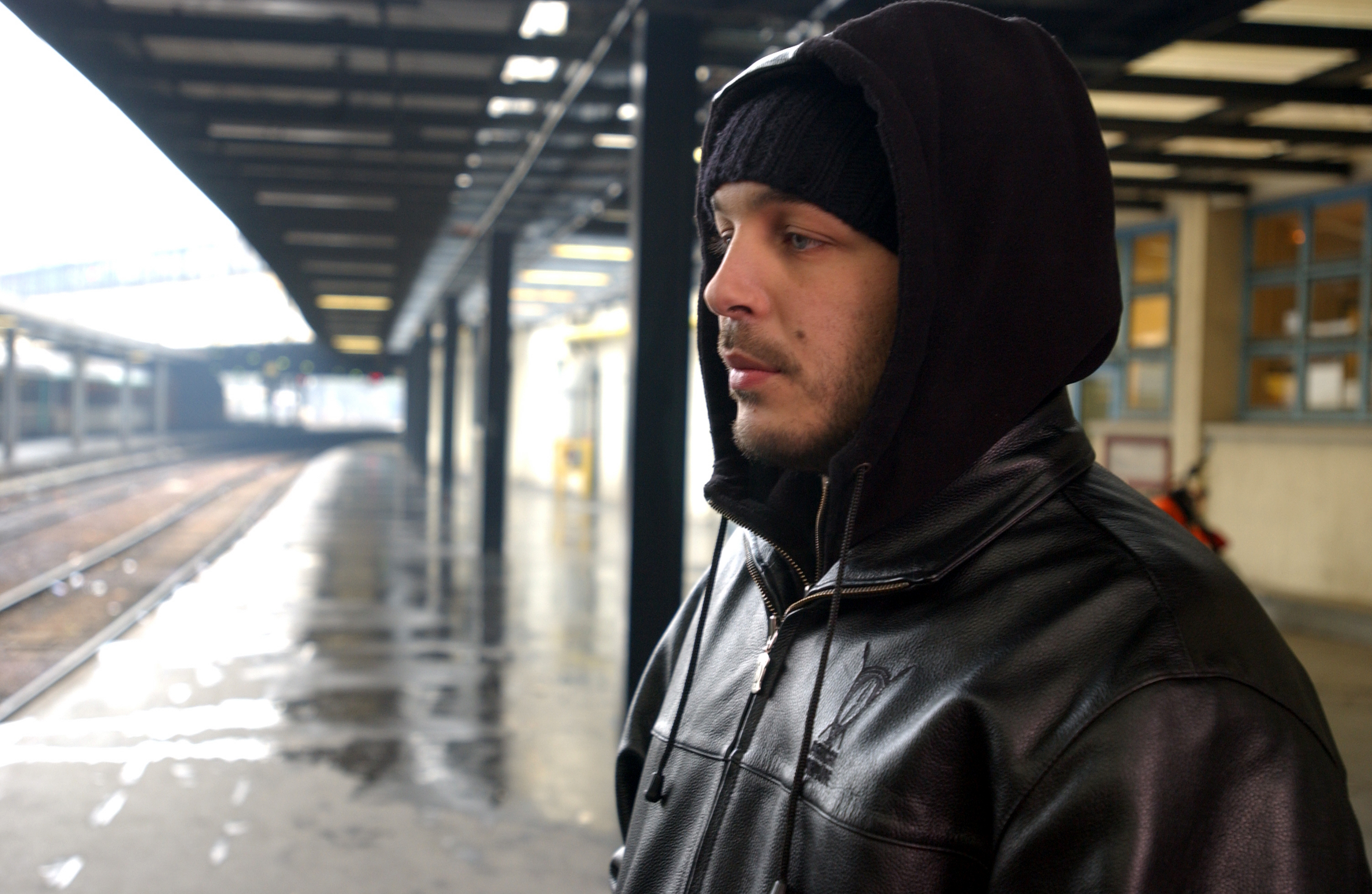 Kader Ayd